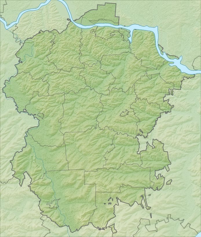 Физическая карта республики Чувашия, Россия. Проекция: Меркатор Координаты для GMT: -R45.88/48.50/54.60/56.35 Инструменты: GMT, Inkscape